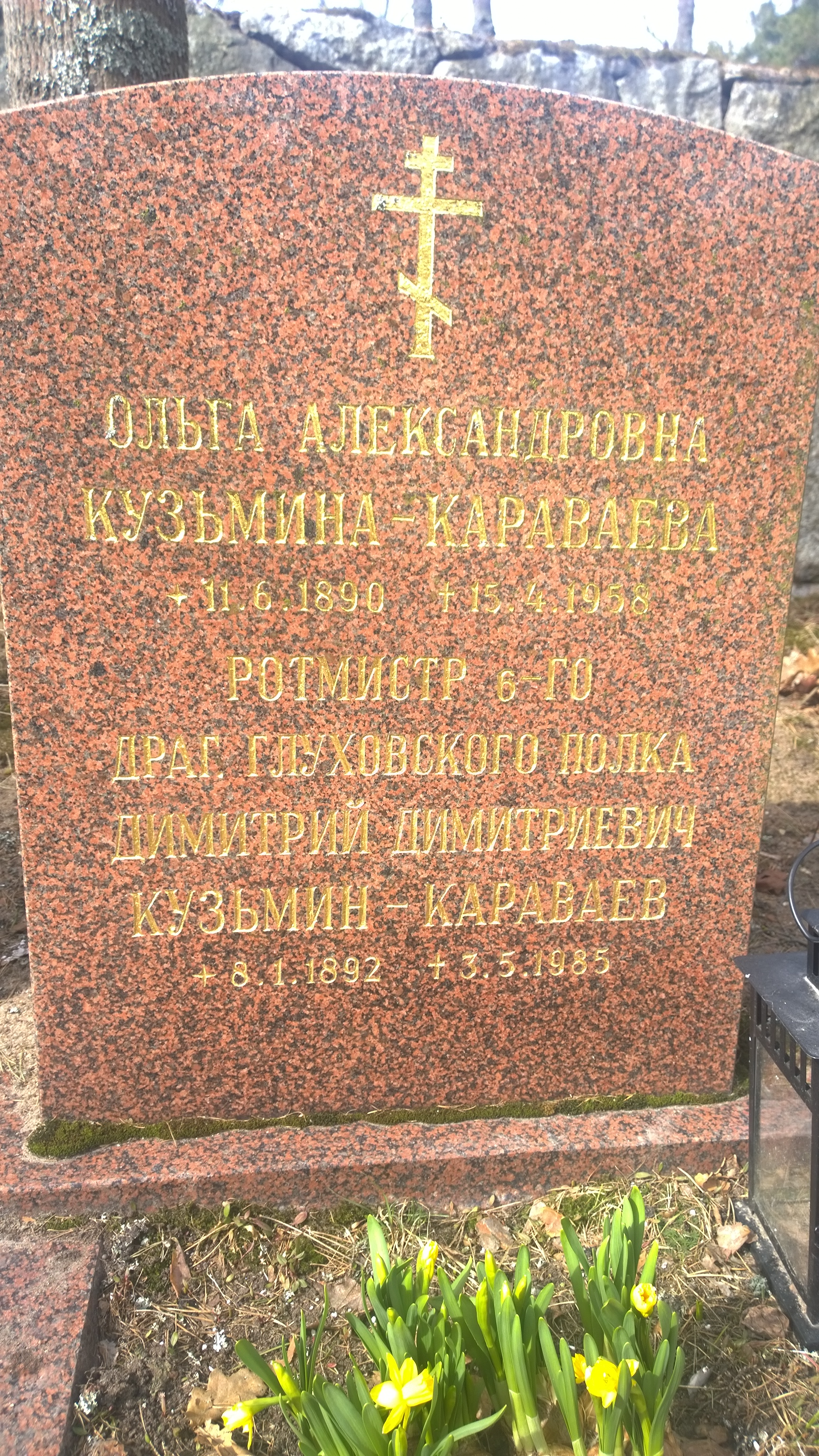 Захоронение ротмистра Д. Д. Кузьмина-Караваева (1892 - 1985) и его супруги О. А. Кузьминой-Караваевой (Гейден) (1890 - 1958)